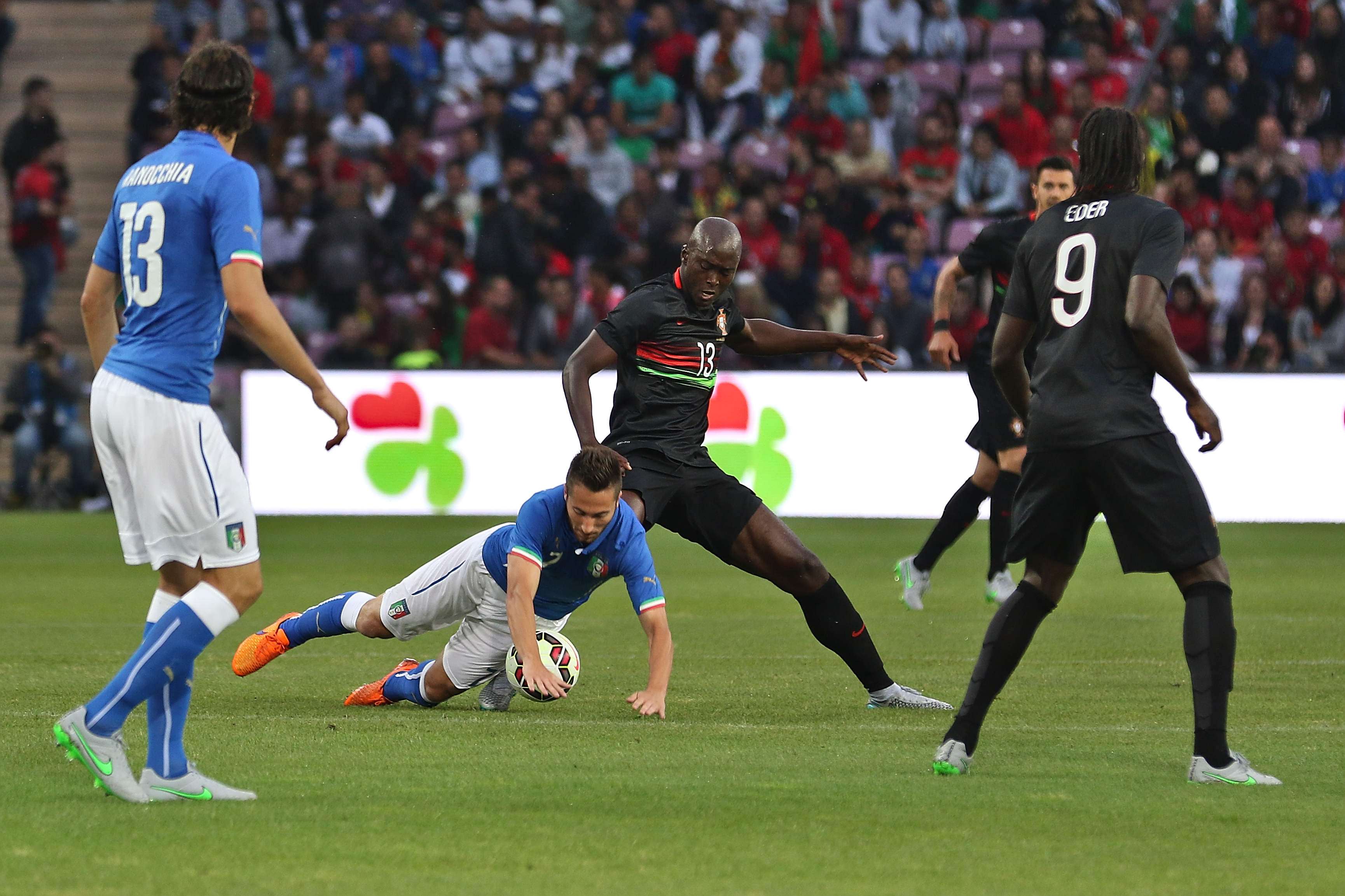 20150616 - Portugal - Italie - Genève - Mattia De Sciglio et Danilo Pereira